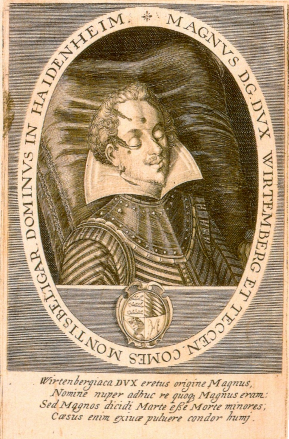 Herzog Magnus von Württemberg auf dem Totenbett, mit den in der Schlacht von Wimpfen, 1622 erhaltenen Hieb- und Schusswunden Kupferstich